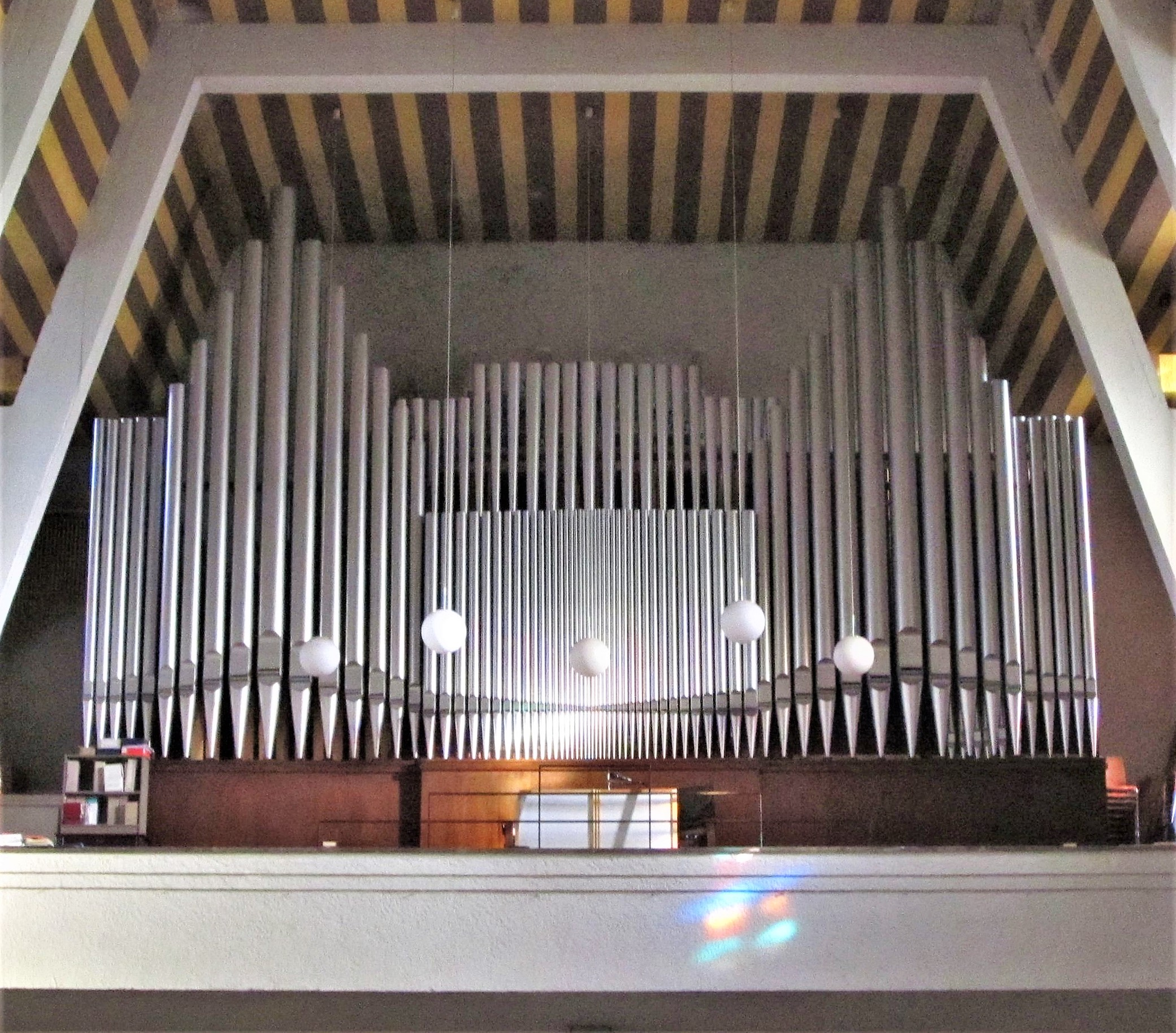 Orgelprospekt der katholischen Pfarrkirche St. Hildegard in St. Ingbert, Saarland